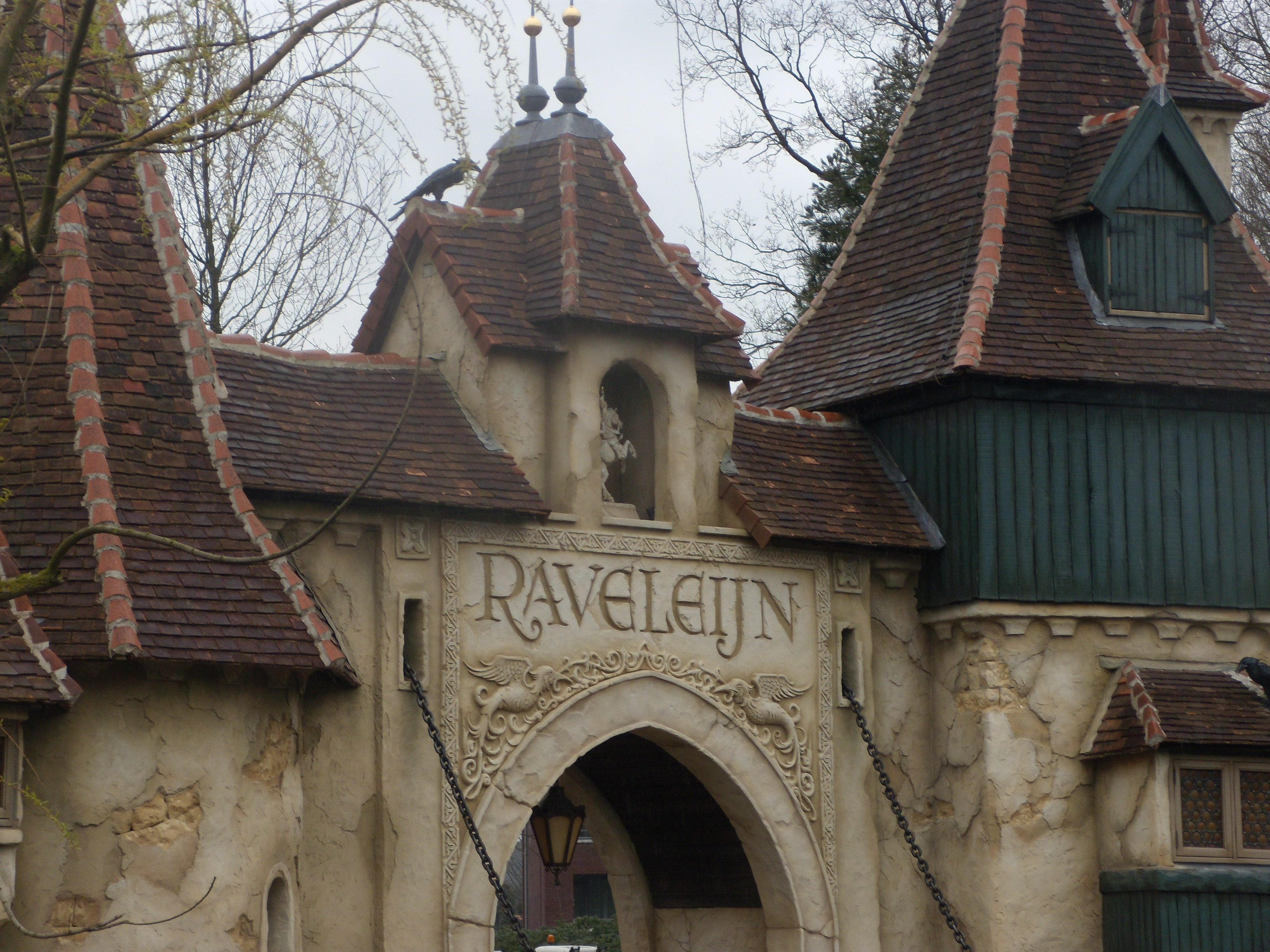 Entrée de Raveleijn dans le parc d'attractions néerlandais Efteling.